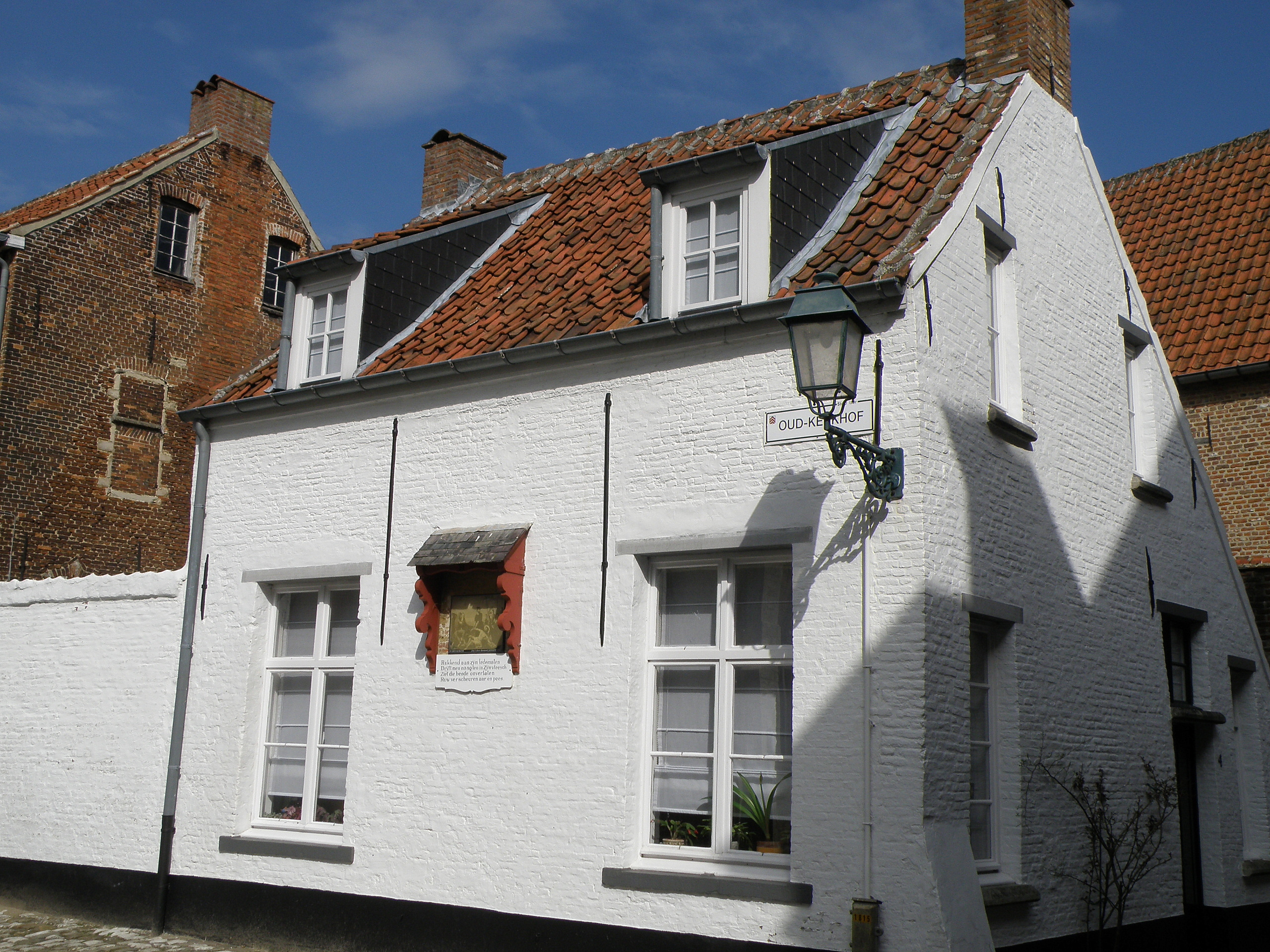 Lierre (en néerl. Lier), ville de Flandre (Belgique), située à une quinzaine de km. au sud-est d’Anvers. Maison dénommée Sint-Ursula (Sainte-Ursule), sise à l'angle de la Sint-Margarethastraat (ou Sint-Margaretastraat, sans h ; litt. rue Saint-Marguerite) et de la rue Oud Kerkhof (litt. ancien cimetière), dans le béguinage.